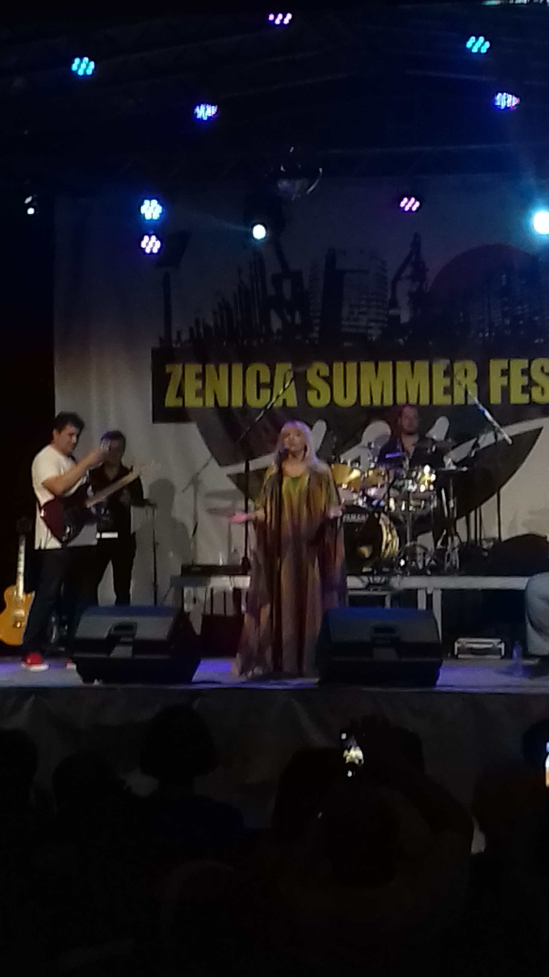 Hanka Paldum, solistički nastup na 16. noći Zenica summer festa